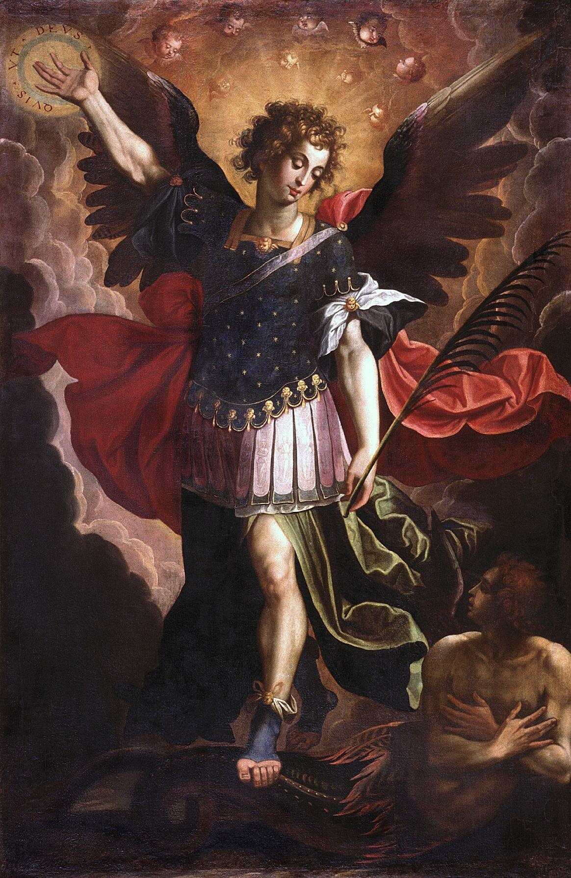 La obra representa al arcángel San Miguel derrotando a Satanás, y es una copia de un grabado por Hieronymus Wierix a partir de Martín de Vos, procedente del monasterio de San Jerónimo de Valparaiso.